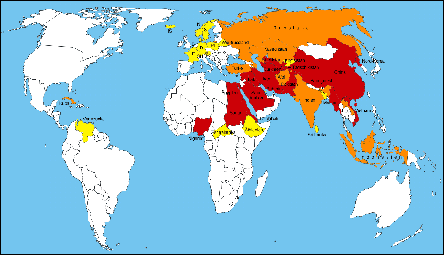 Weltkarte: Einschränkungen der Religionsfreiheit